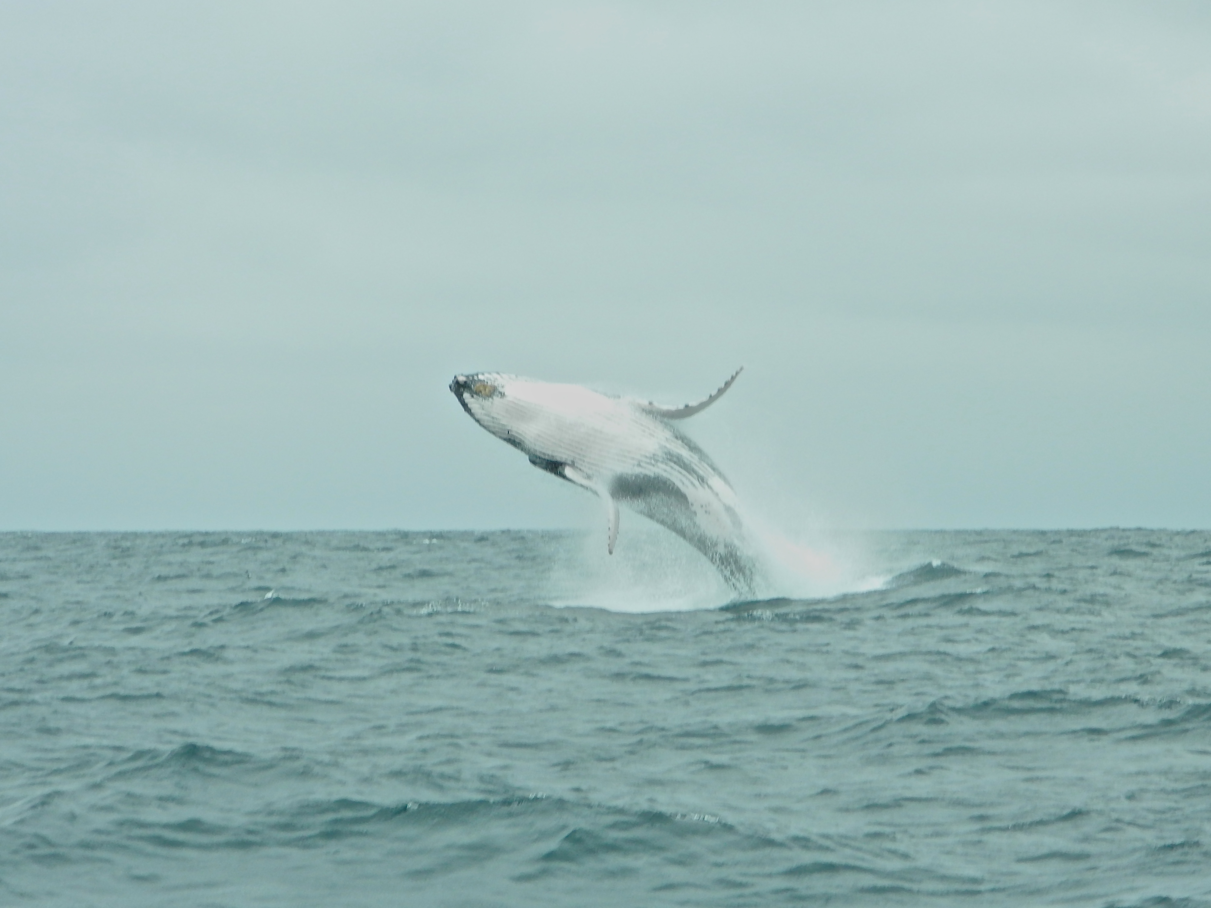 Near Puerto Lopez, Ecuador